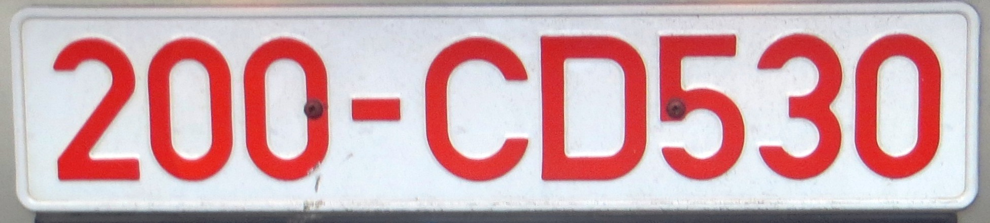 CD kenteken Portugal